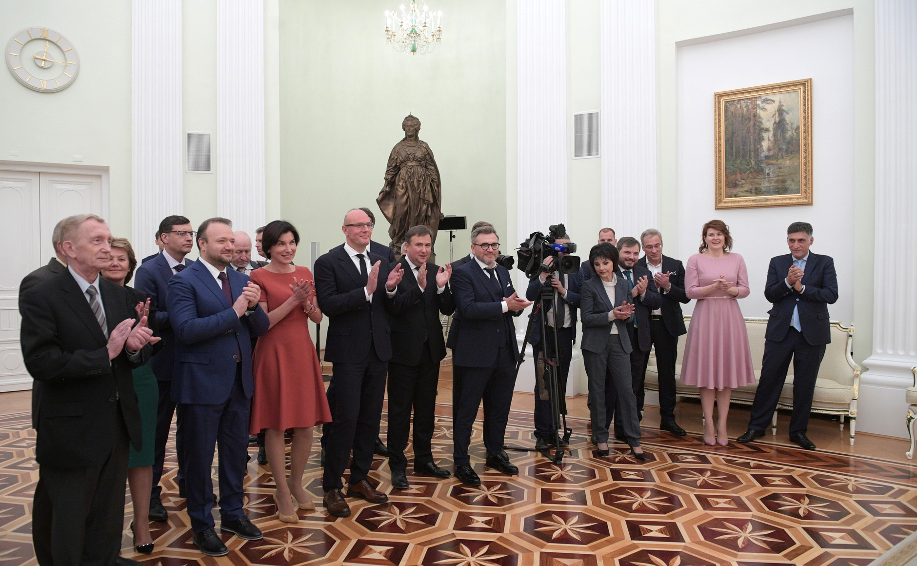 Встреча Президента Российской Федерации Владимира Путина с коллективом телекомпании НТВ.